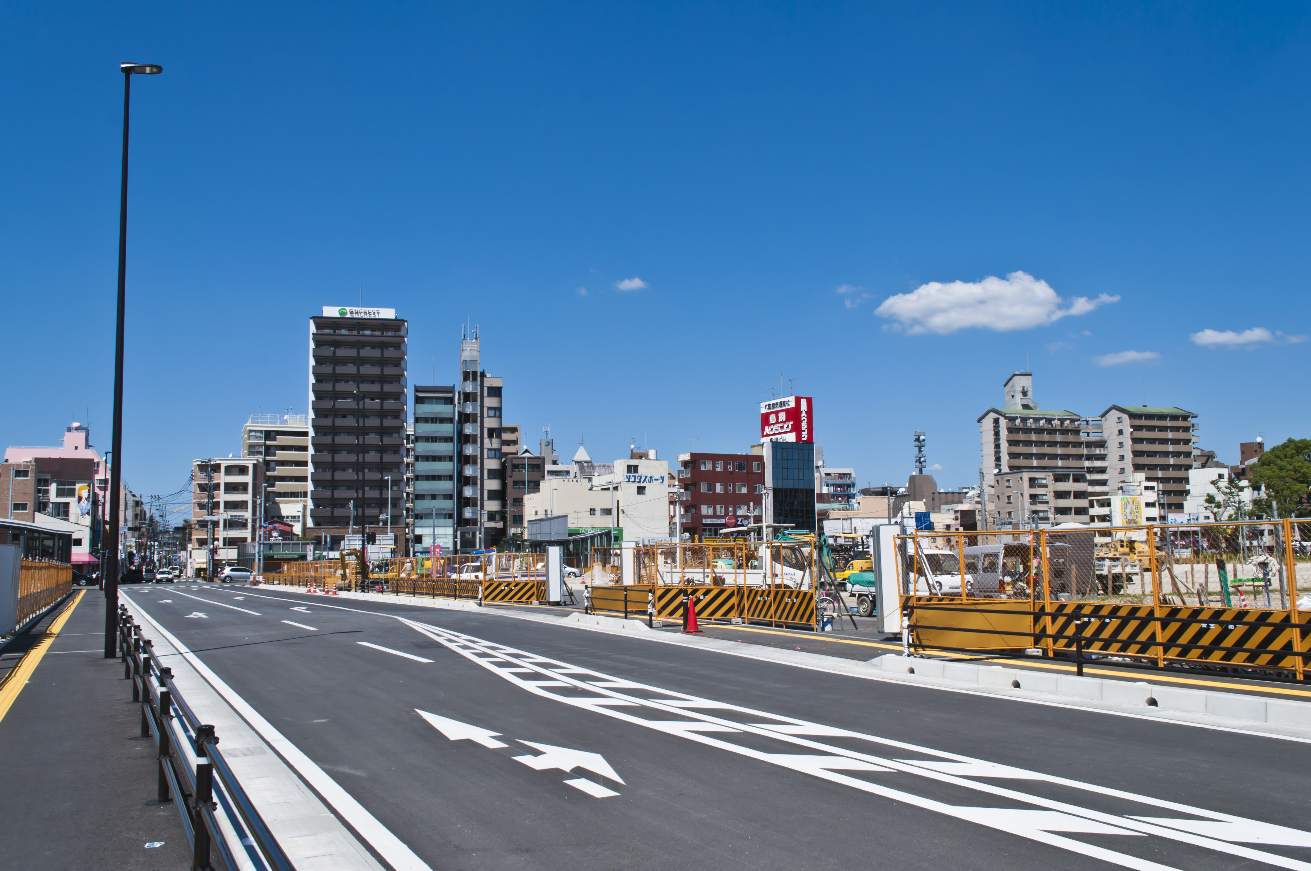 六本松地区。九大跡地の道路から撮影。